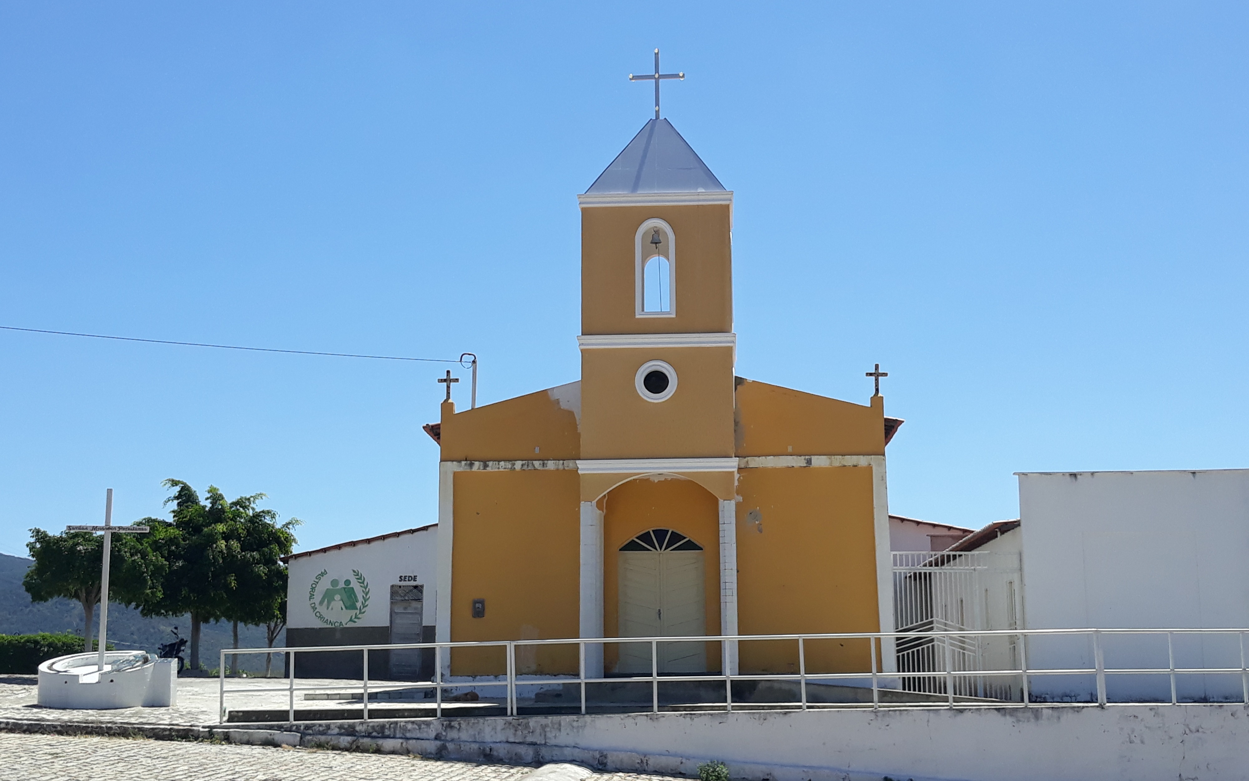 Capela de São Vicente, da paróquia São Sebastião do Encanto, Rio Grande do Norte (Brasil)